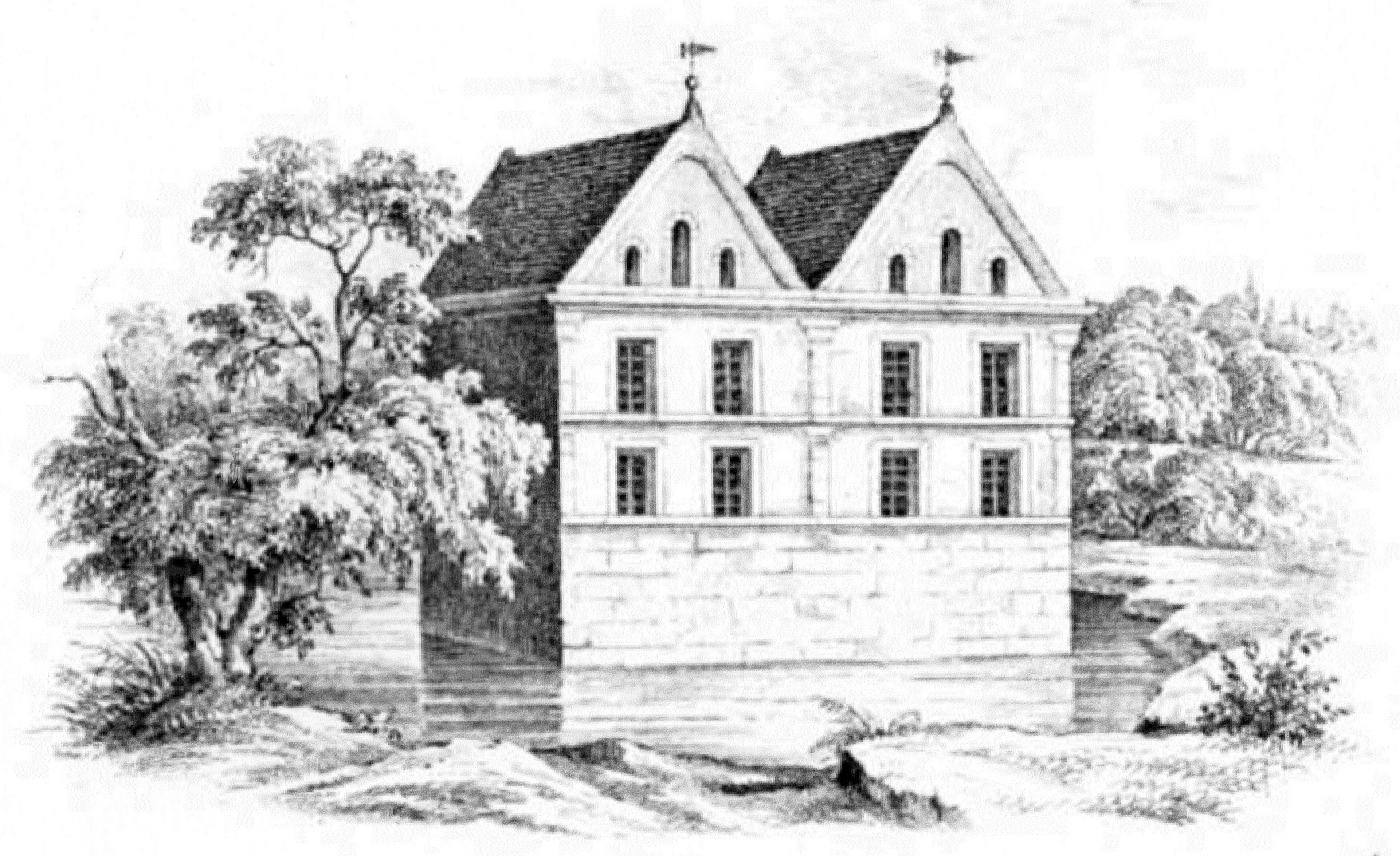 Das alteHerrenhaus Mühlendorf, Zeichnung von Köhler und Roisternitz 1862